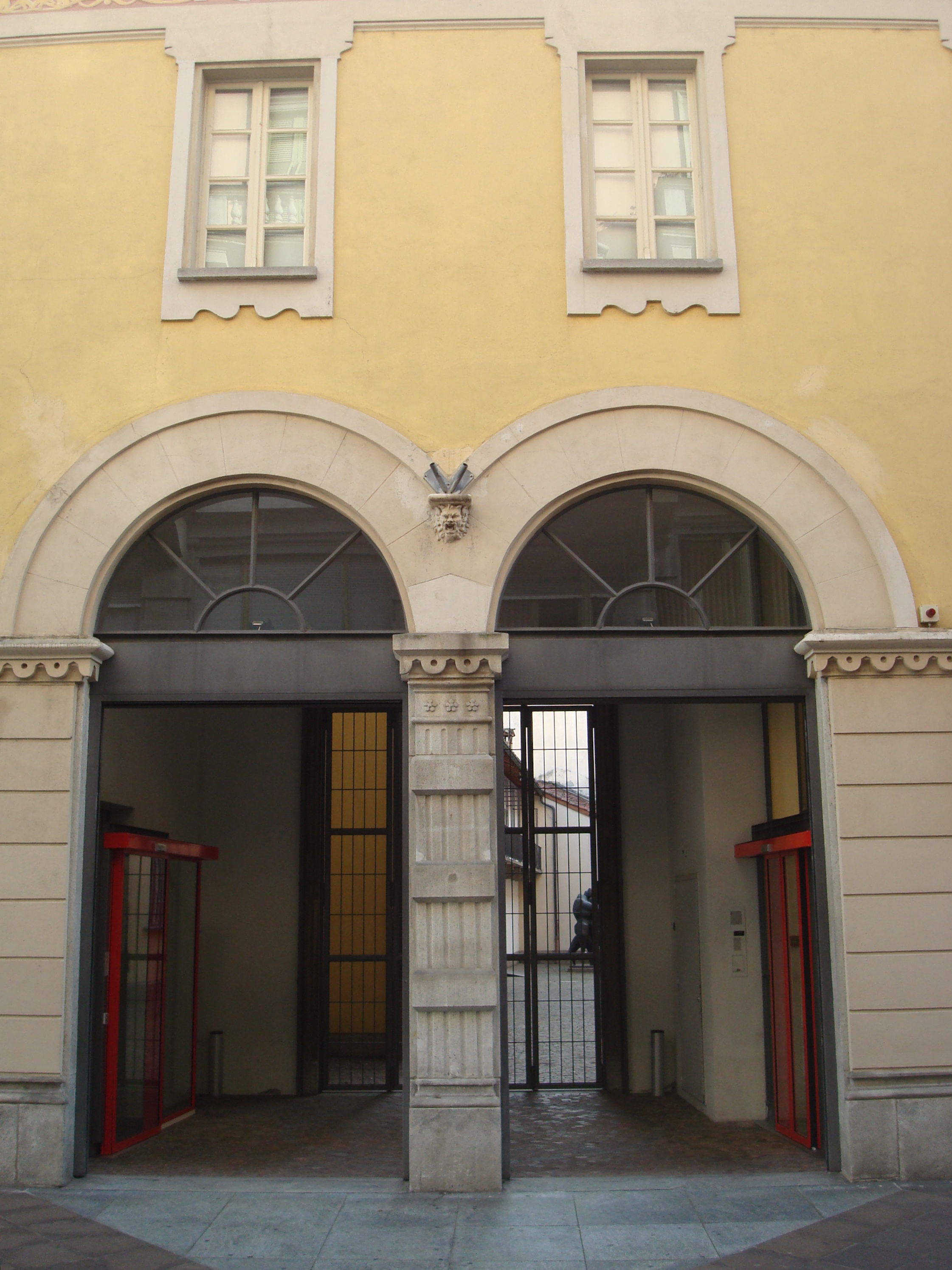 Musée cantonal d'Art de Lugano, Via Canova, 10 - 6900 Lugano